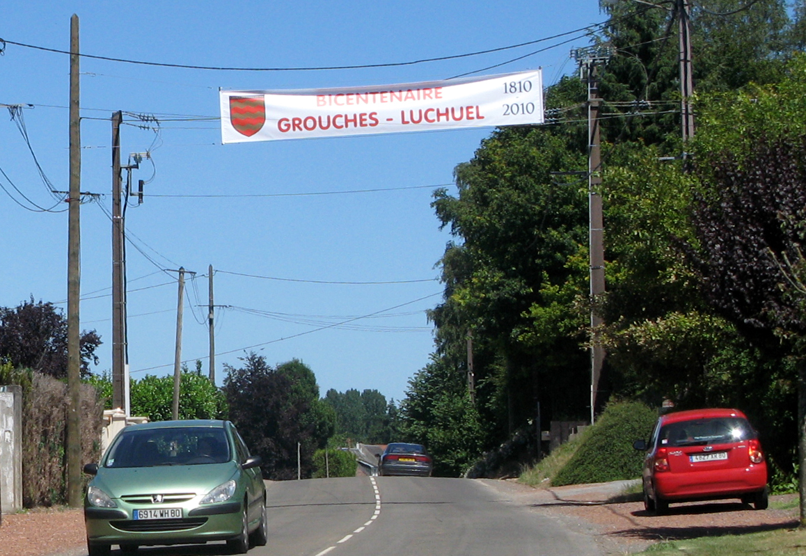 Grouches-Luchuel (Somme, France) - La semaine de commémoration du Bicentenaire de la fusion des deux communes est signalée par une banderole, sur la route principale, peu après l'entrée du village. . .